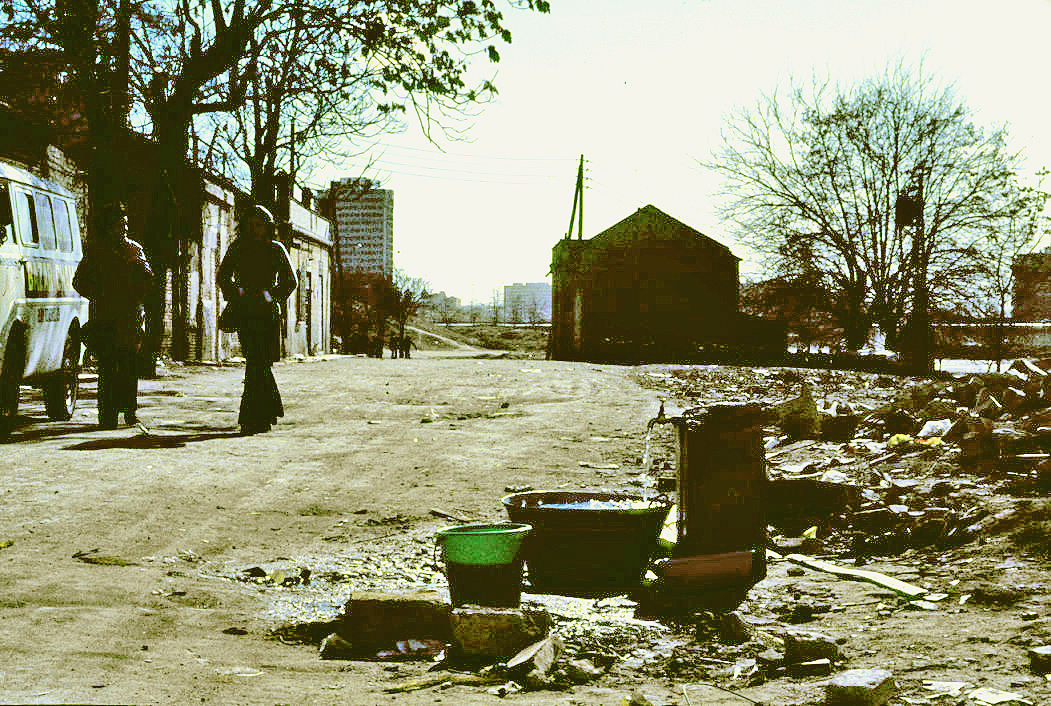 Calle de la desaparecida Quinta de la Paloma. Madrid (España)